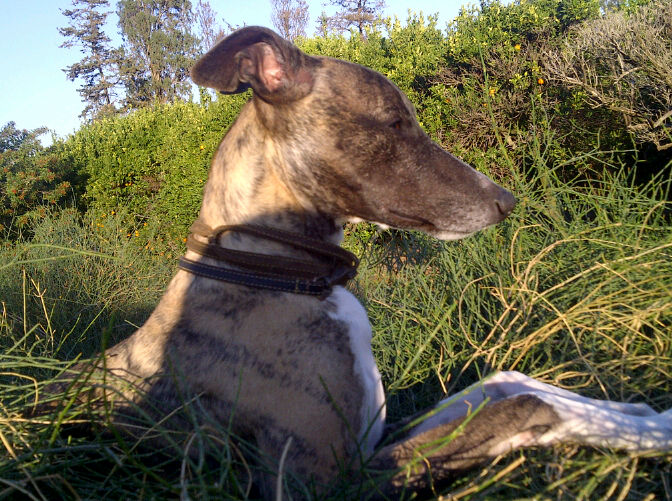 וויפט בוגר